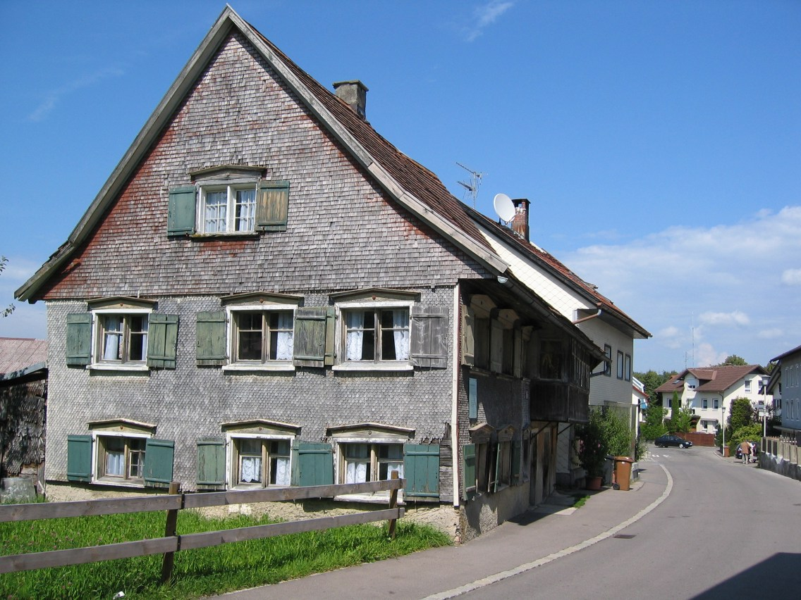 Das älteste Haus von Lindenberg Allgäu, erbaut im Jahr 1590. War noch bis ca 1992 bewohnt. Hansenweiher Str. 6